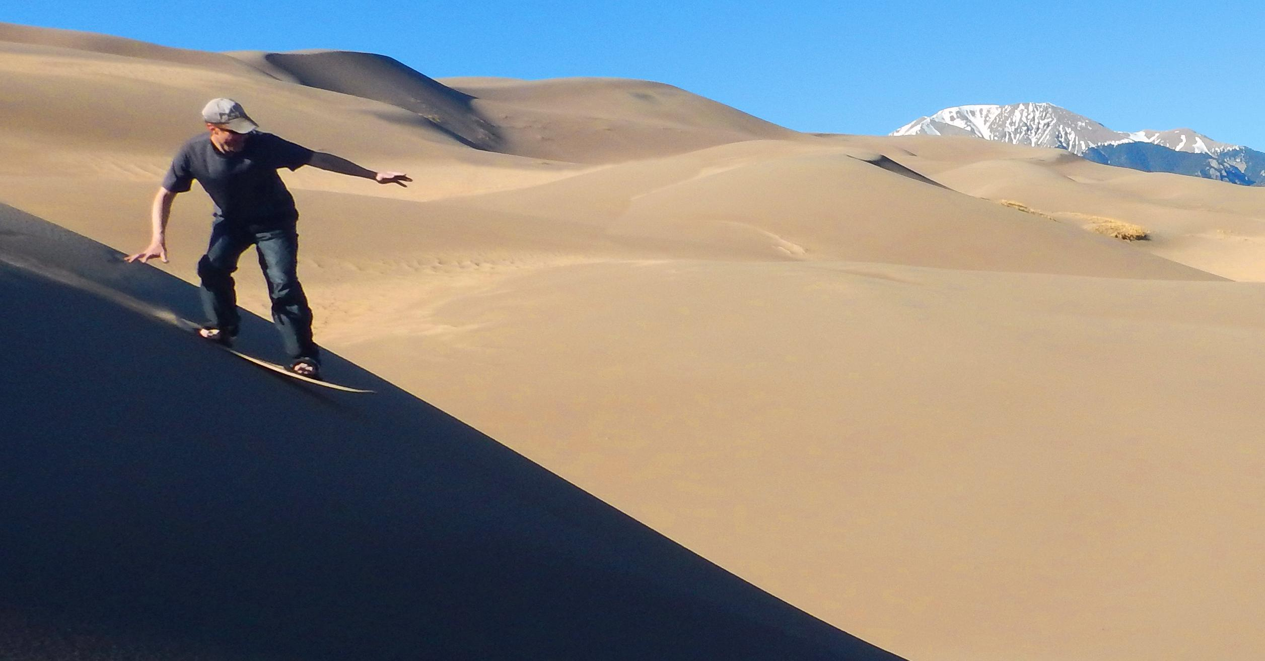 NPS/Joseph Tumidalsky